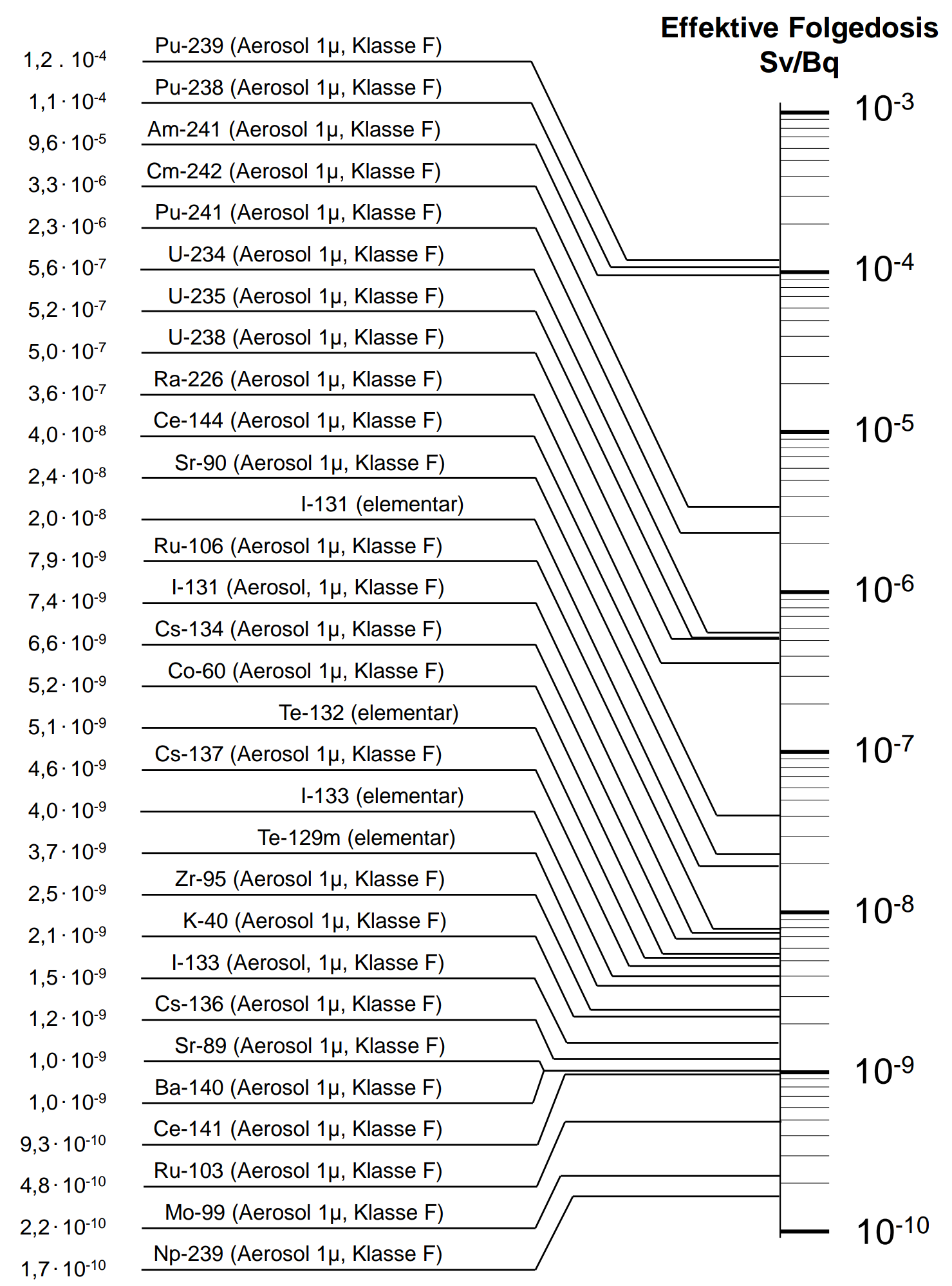 Dosiskoeffizienten (effektive Folgedosis) durch Inhalation ausgewählter Radionuklide